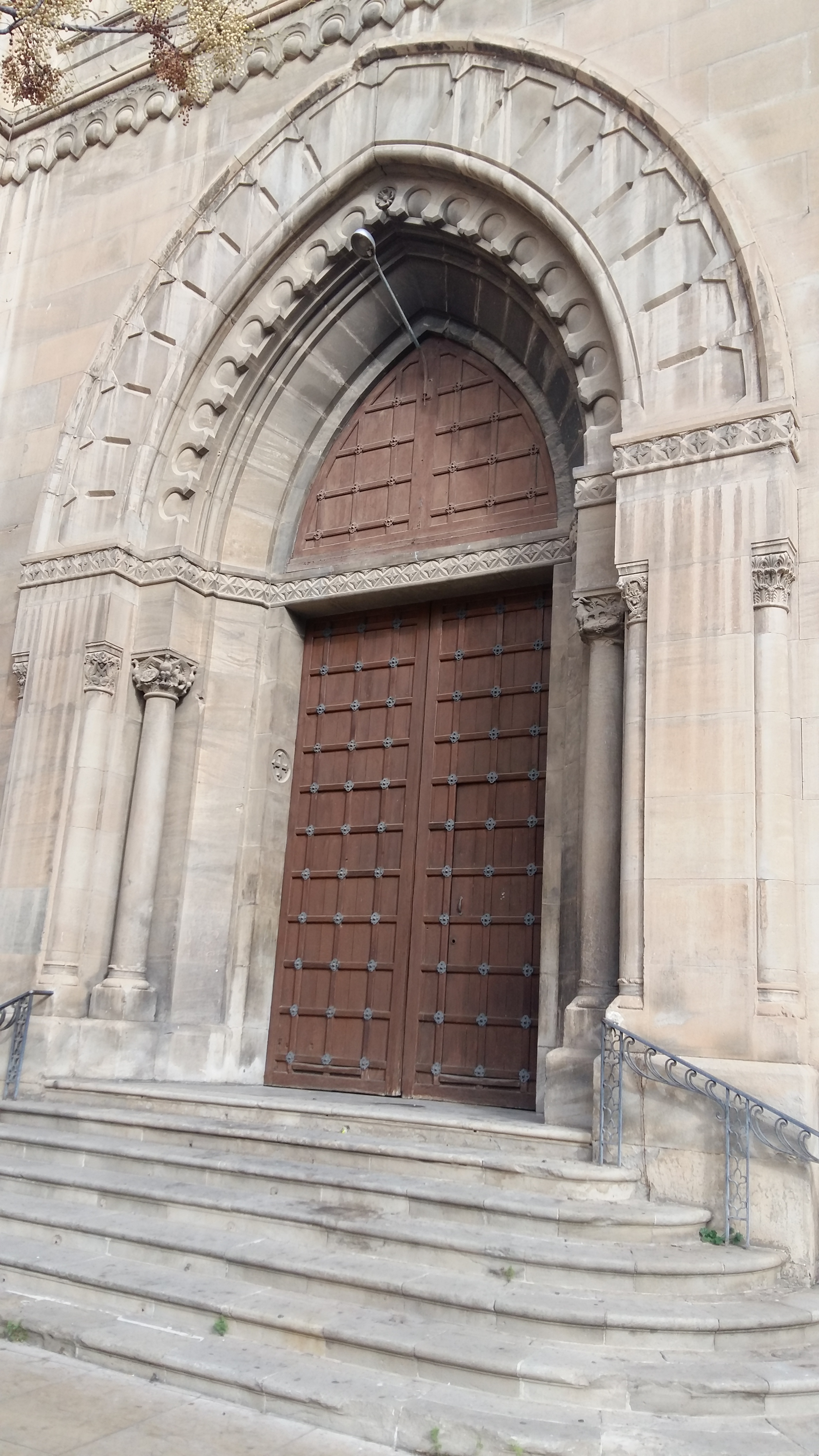 Portada de l'església per la part de la plaça Sant Joan.